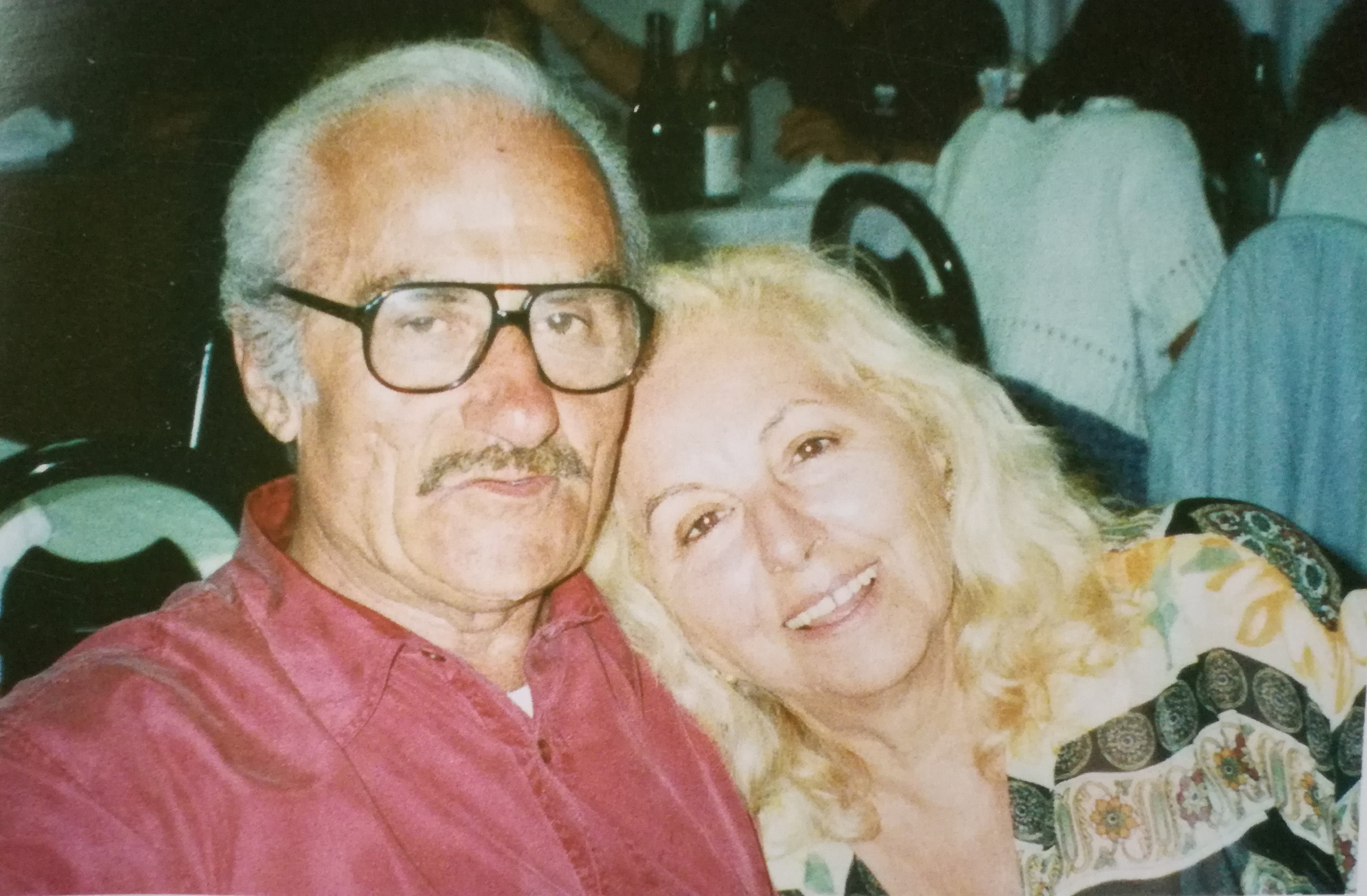 Foto del pittore Renzo Magnanini insieme alla moglie Giuliana